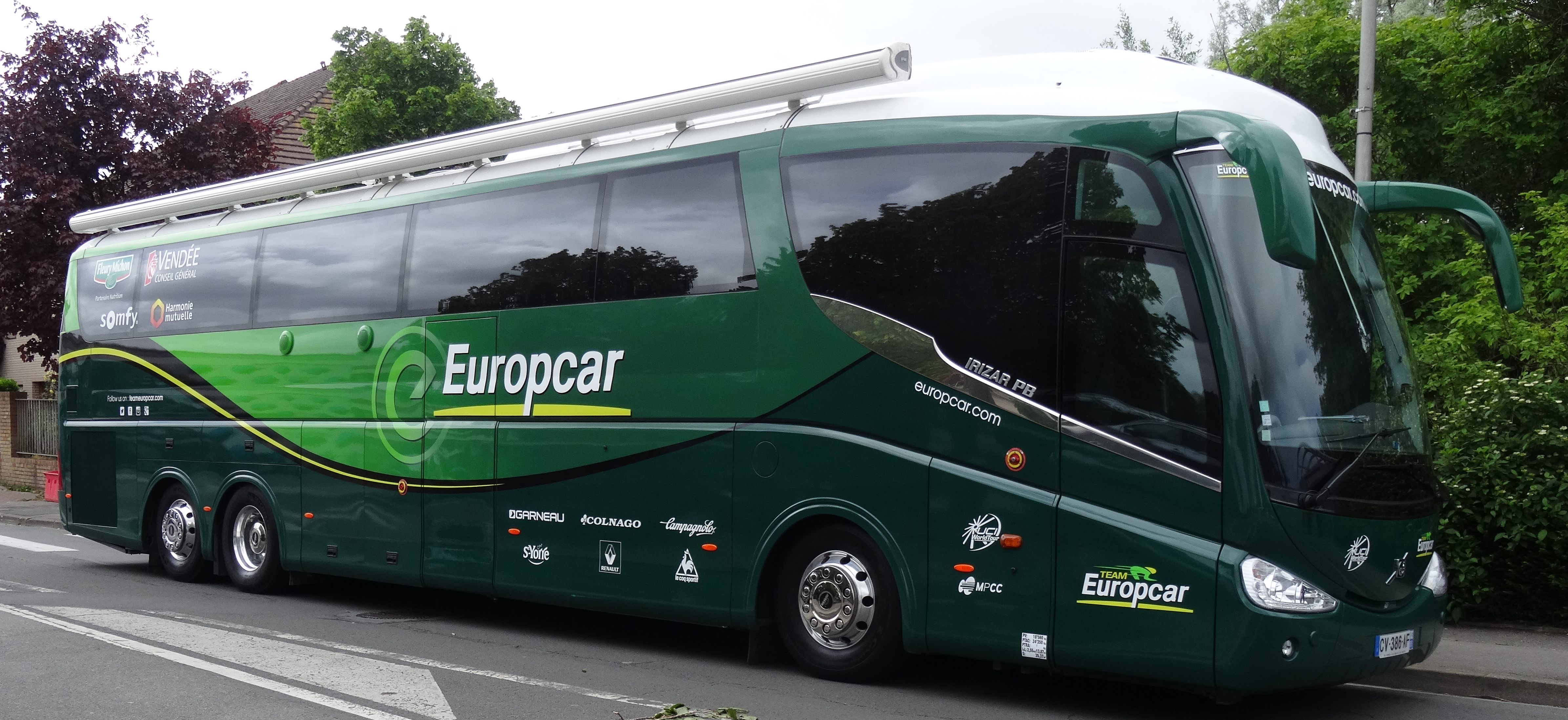 Reportage photographique réalisé le dimanche 11 mai 2014 à l'arrivée de la cinquième et dernière étape de l'édition 2014 des Quatre jours de Dunkerque à Dunkerque, Nord, Nord-Pas-de-Calais, France. Depicted team: Europcar